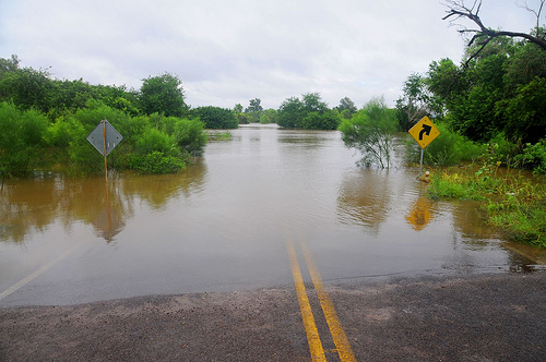 Division Higuera de Zaragoza Sindicatura de Ahome por San Jose